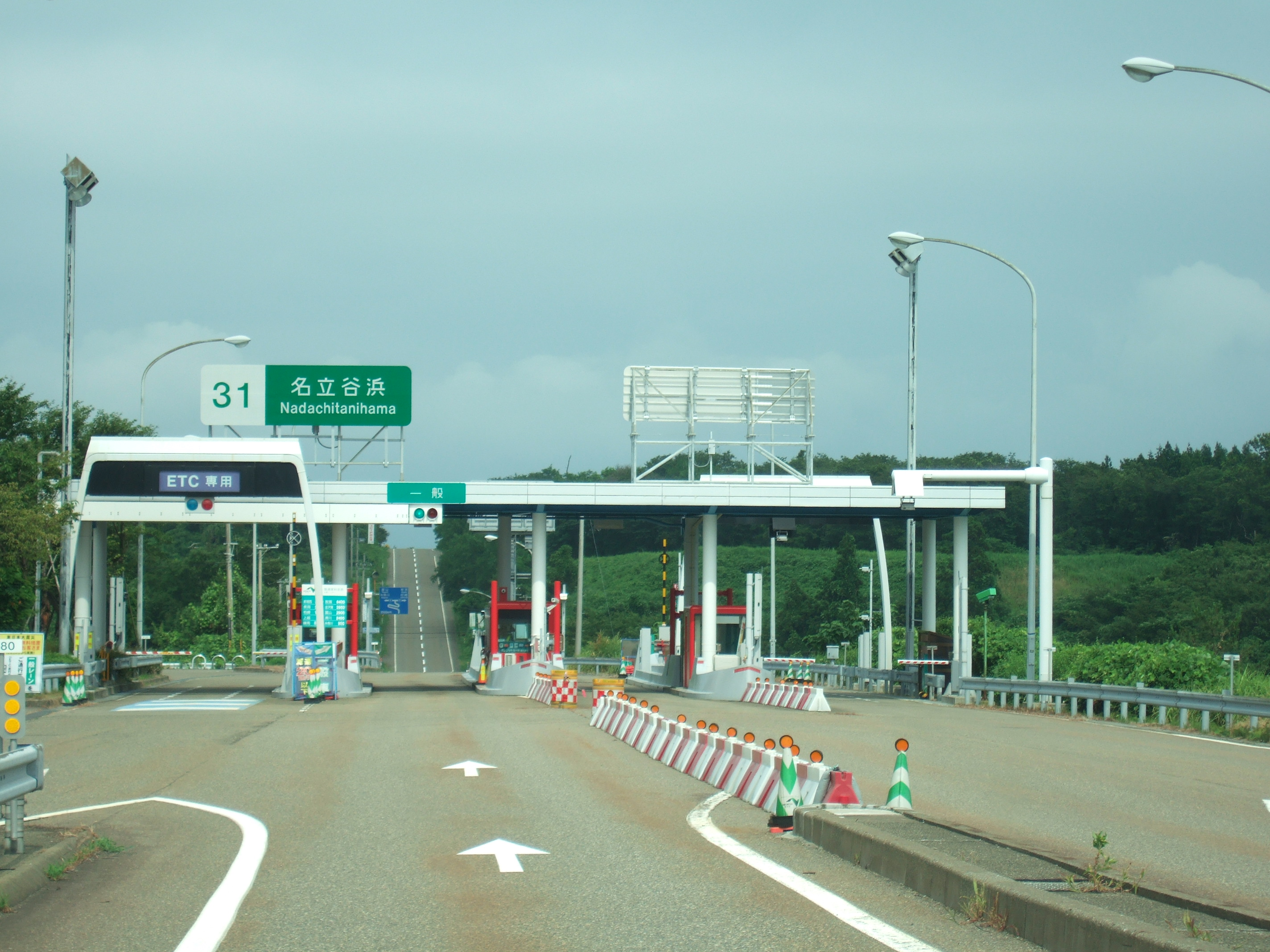 名立谷浜インターチェンジ出口料金所